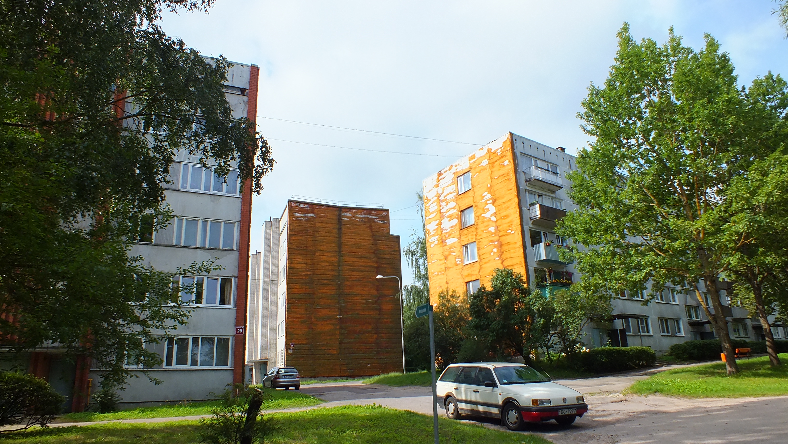 Living houses in Saulkalne